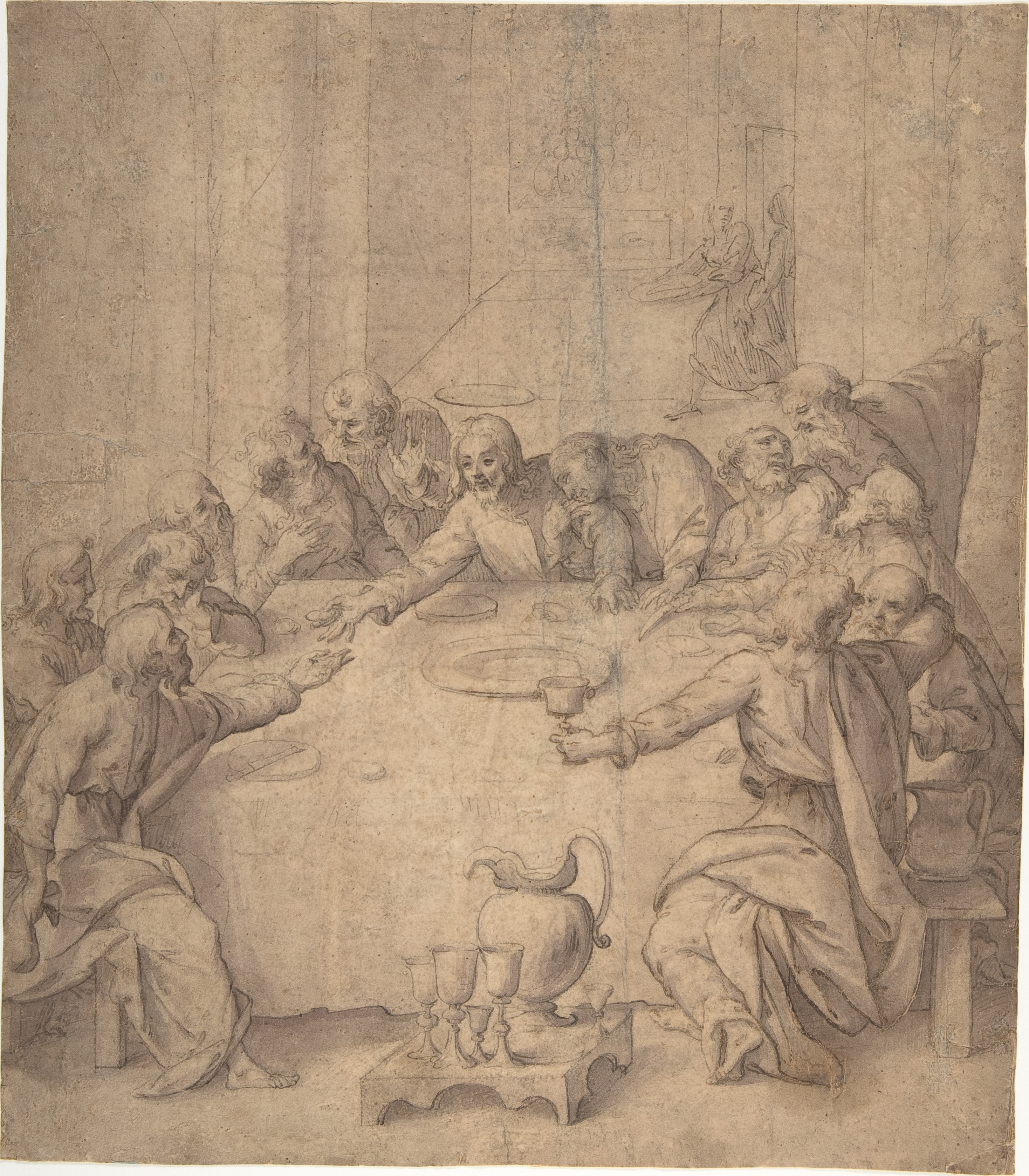 Drawing; Drawings